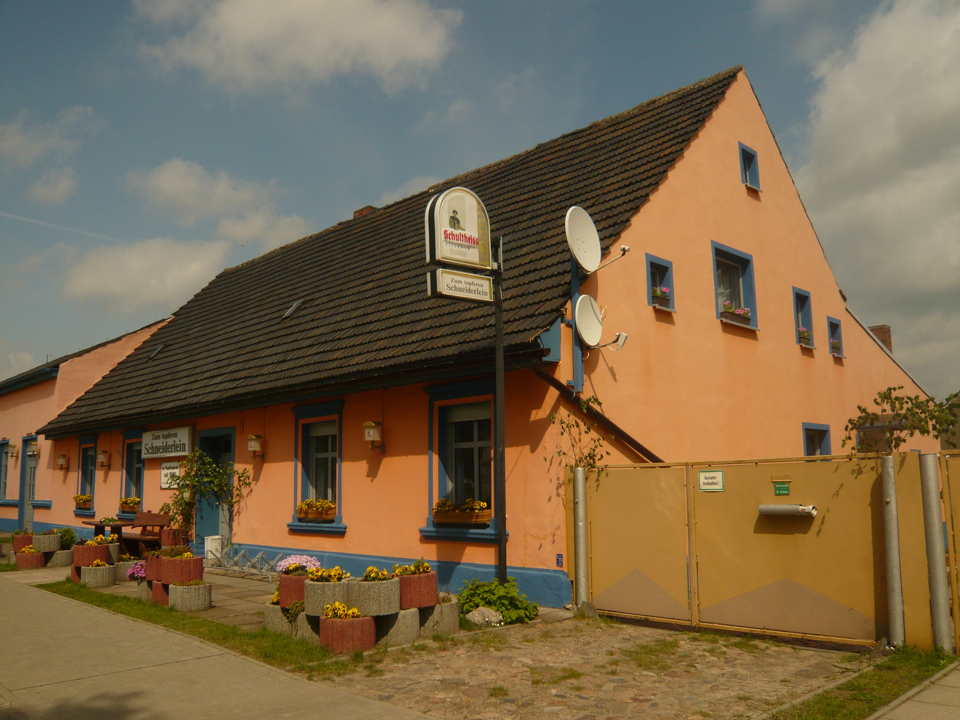 Gemeinde Wandlitz, Ortsteil Klosterfelde, Gasthaus Tapferes Schneiderlein